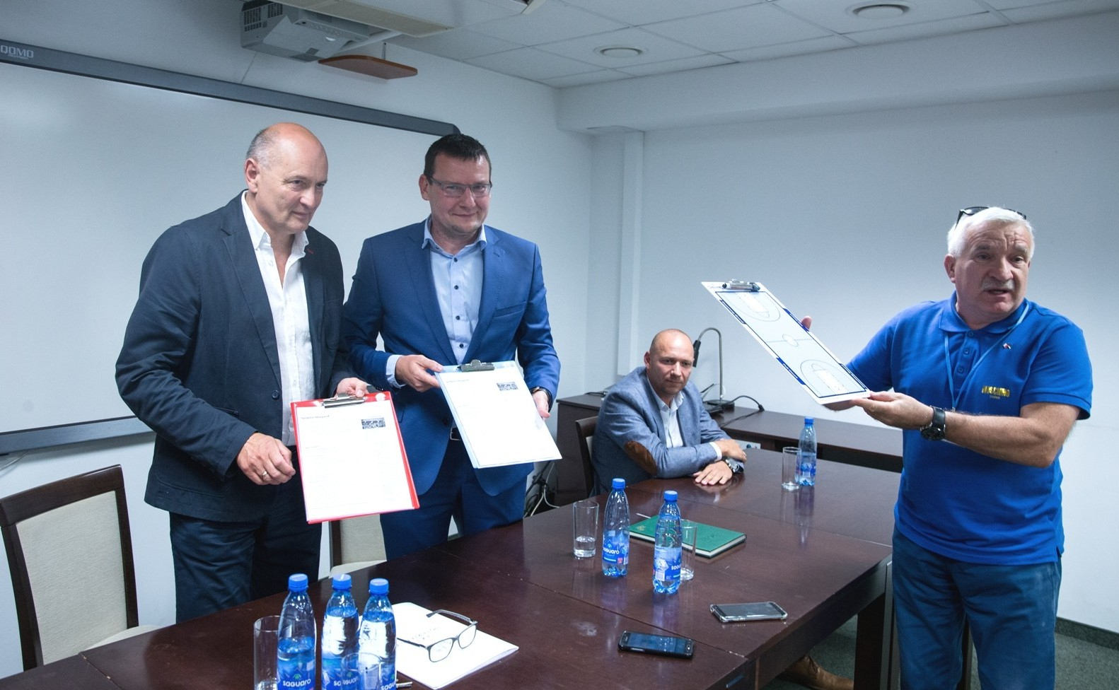 Konferencja prasowa Spójni Stargard SSA. Podziękowanie od Wikipedii. ( 02.07.2018)